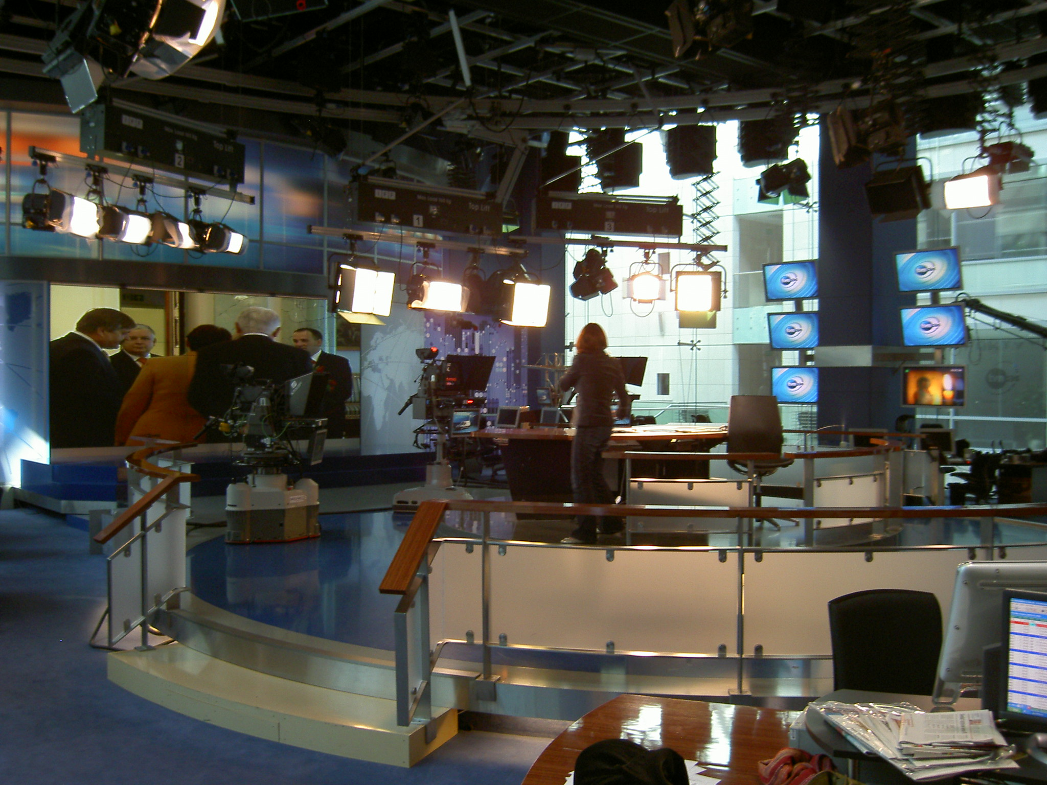 Dawne studio Faktów TVN i TVN24 autorzy: Bartosz Basta i Marcin Sikora